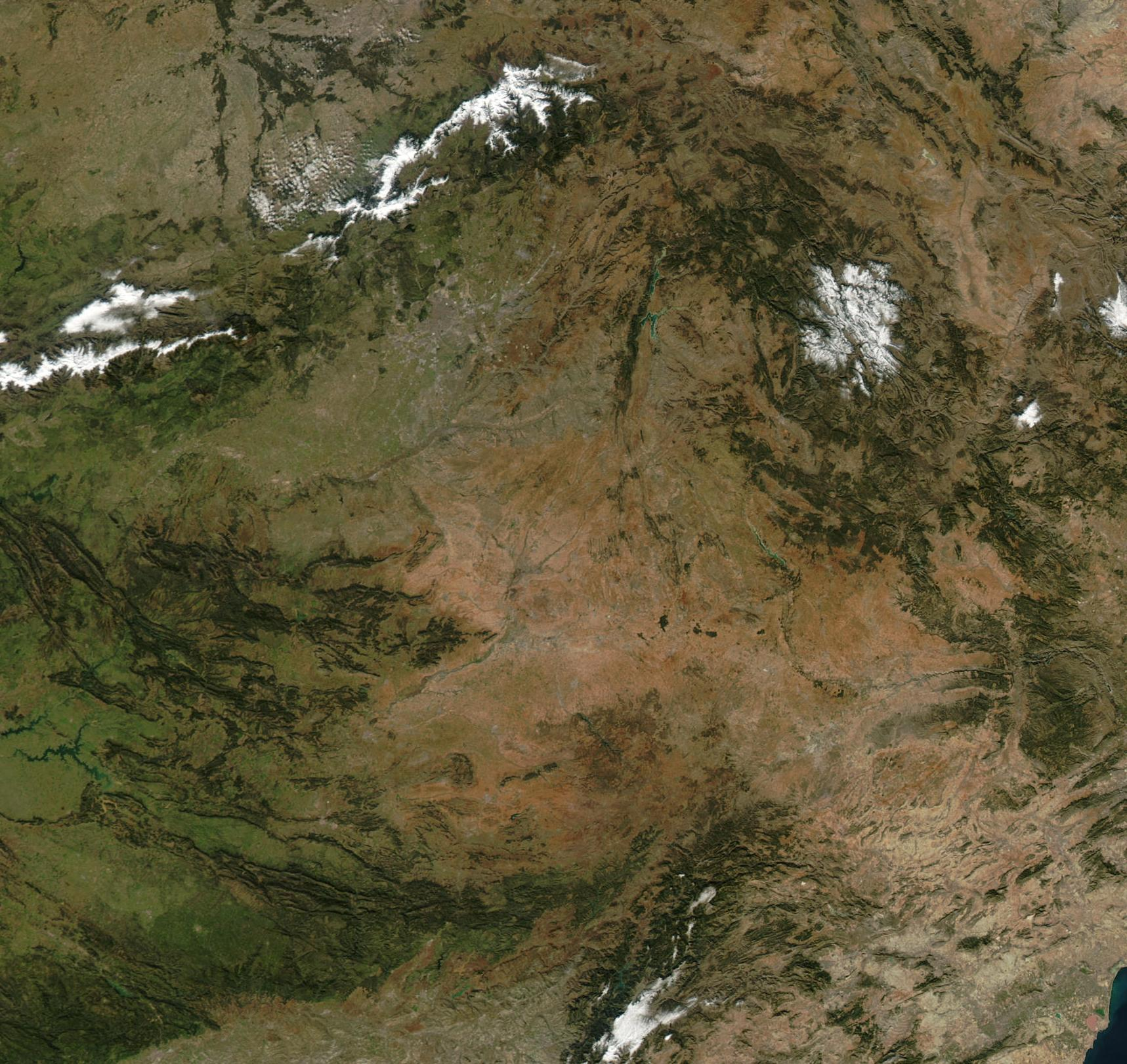 Fotografía hecha mediante satélite de la NASA de Castilla-La Mancha, recortada de la imagen Spain_Portugal_Jan_2003.jpg.